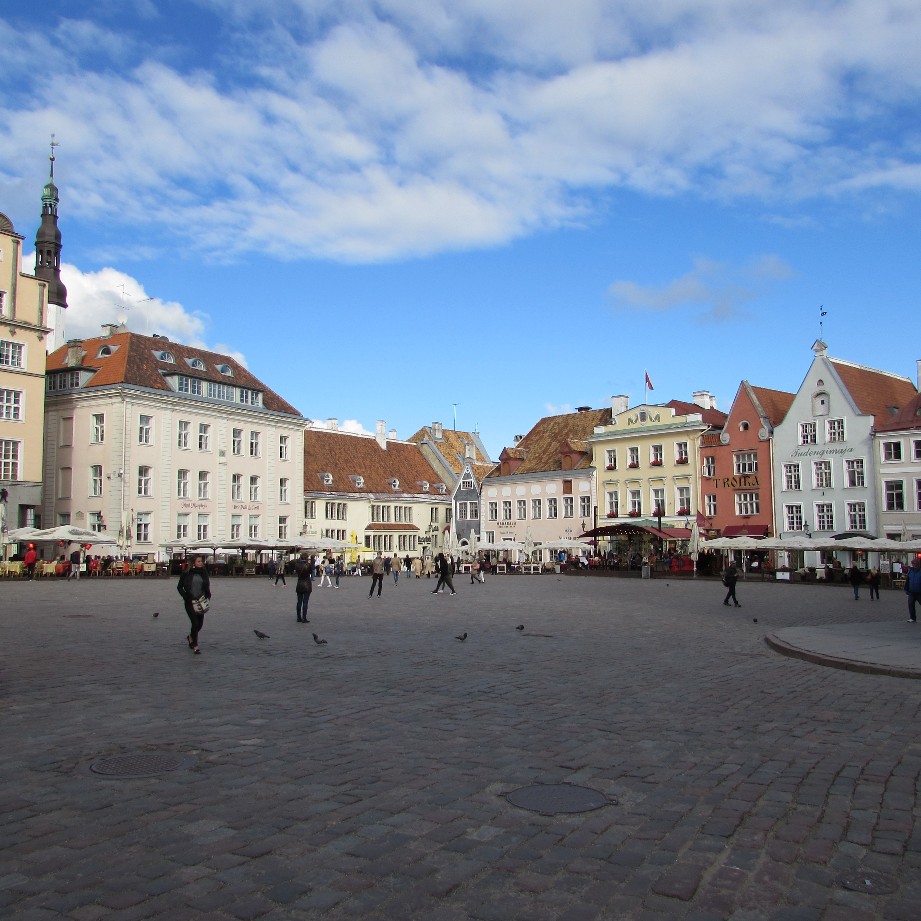 Raekoja plats